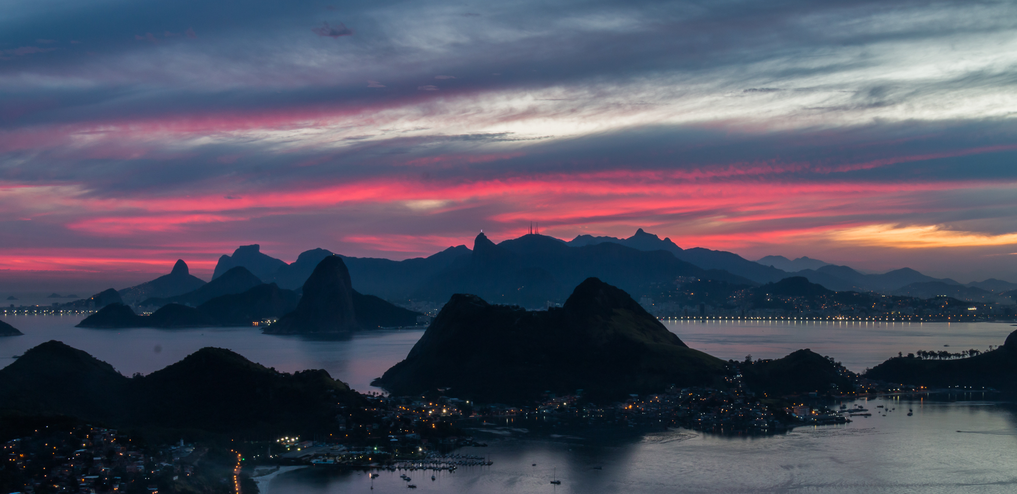 Vista do Parque da Cidade em Niterói